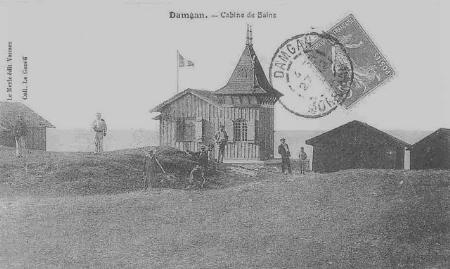 Cabine de plage - Damgan